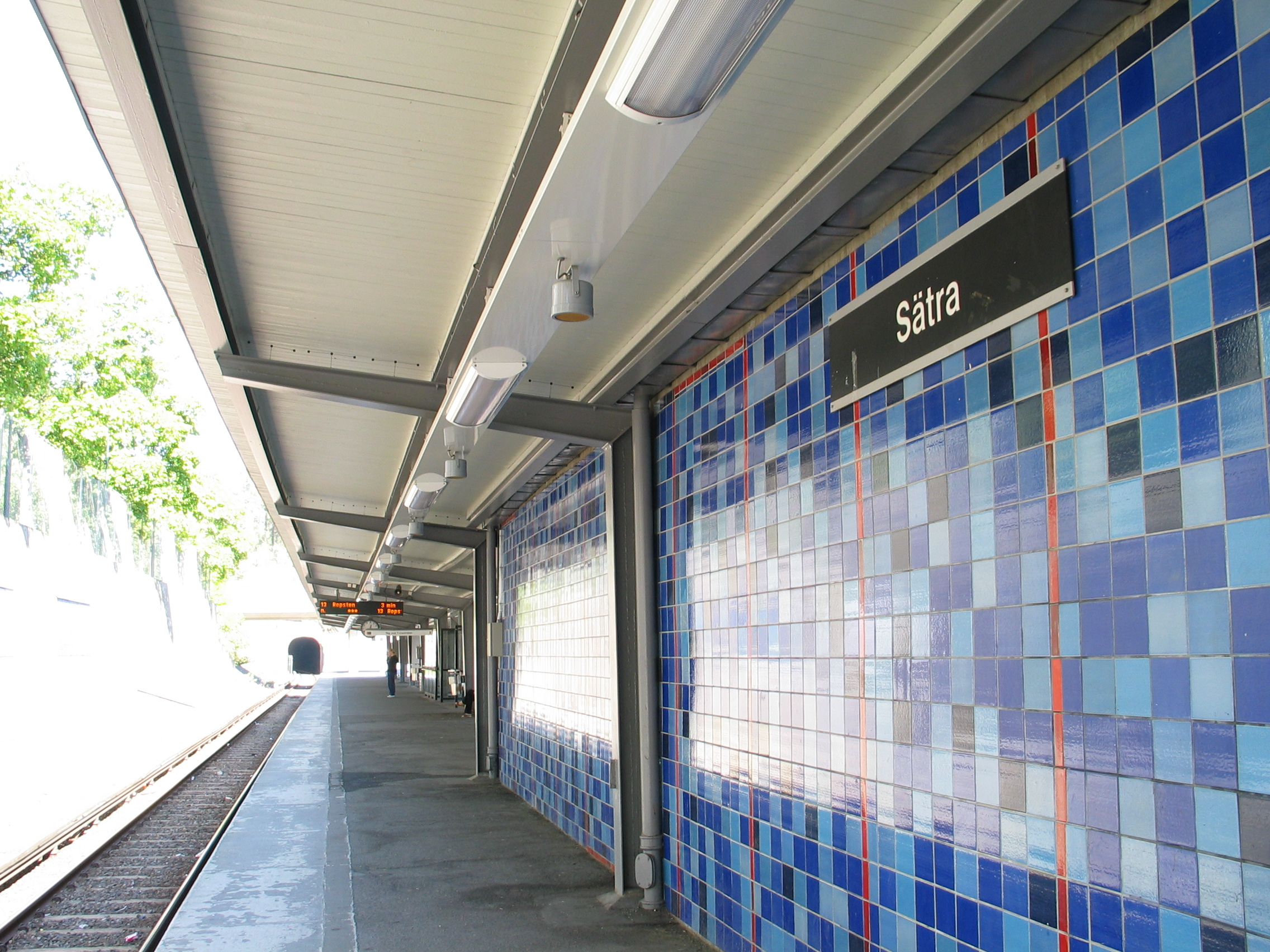 Sätra, a metro station in Stockholm, Sweden.